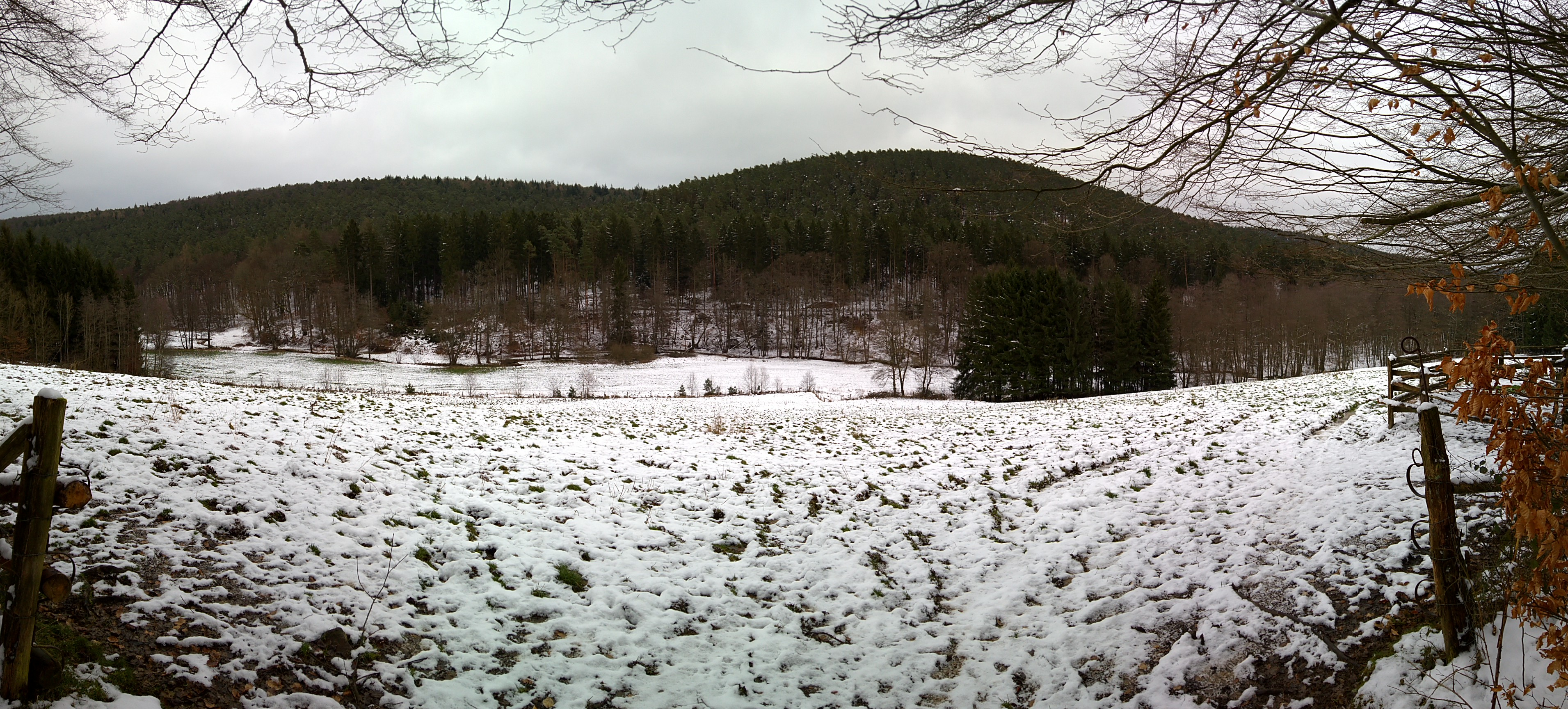 Das "Naturschutzgebiet Geierstal von Vielbrunn" im oberen Ohrnbachtal nördlich des Golfplatzes, im Hintergrund der Geißberg mit dem Erdwerk Ohrenbacher Schanze